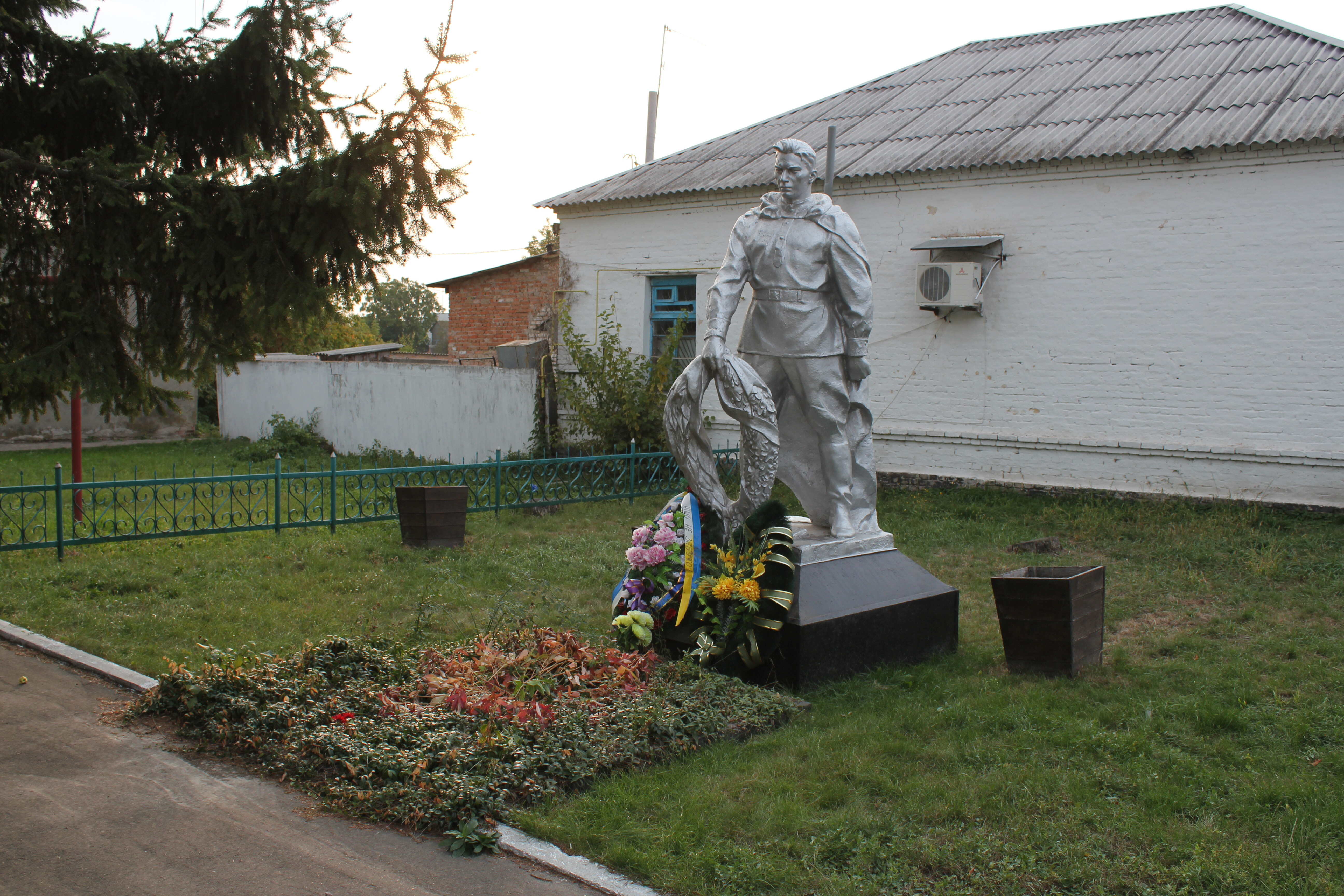 Братська могила воїнів Радянської Армії, які загинули в роки Великої Вітчизняної війни, село Переяславське, біля привокзальної площі